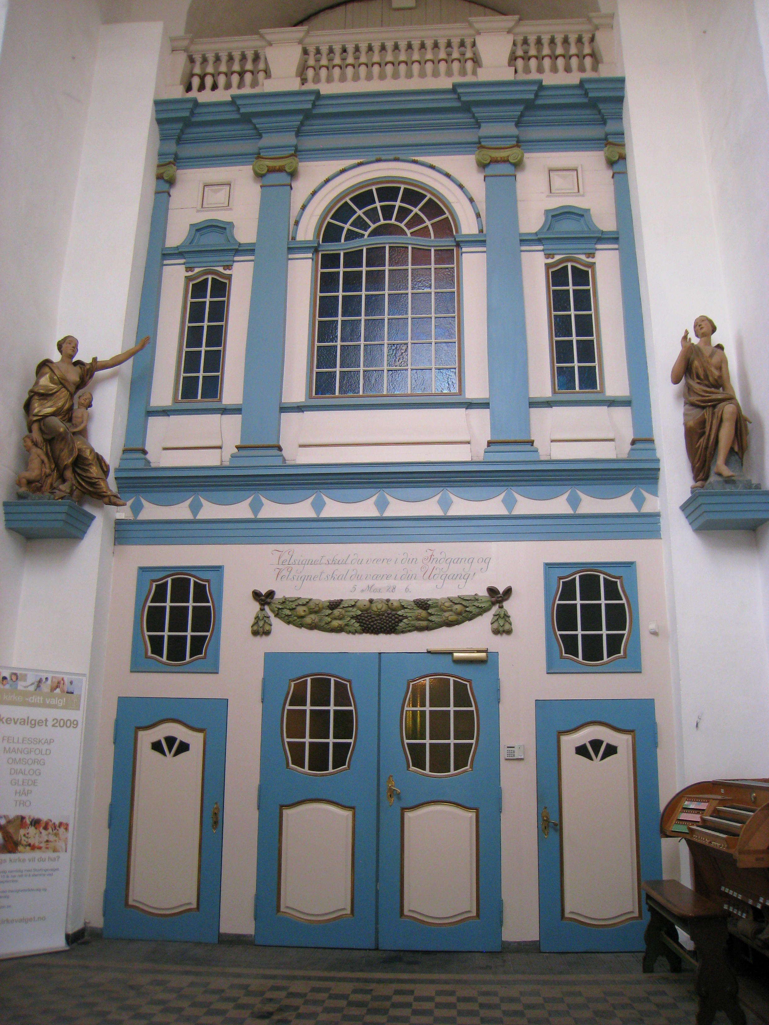 Vår Frue kirke, Trondheim, Norway.